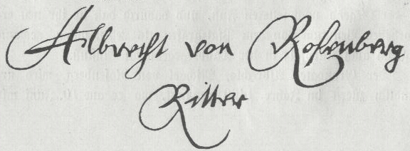 Die Unterschrift des Ritters Albrecht von Rosenberg unter einen Brief vom 24. November 1559 an den Herzog Christoph von Württemberg